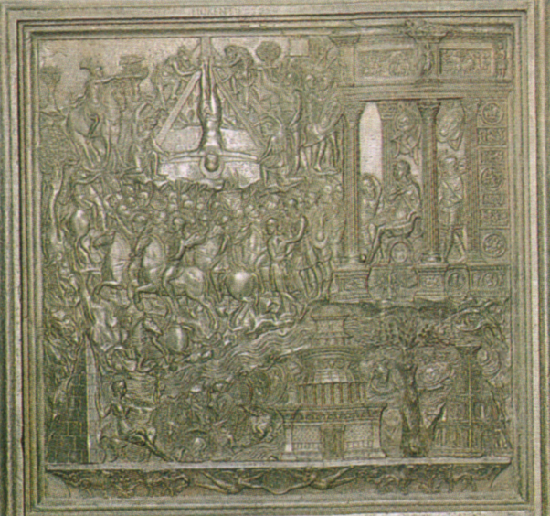 FILARETE Bronze door Bronze Basilica di San Pietro, Vatican